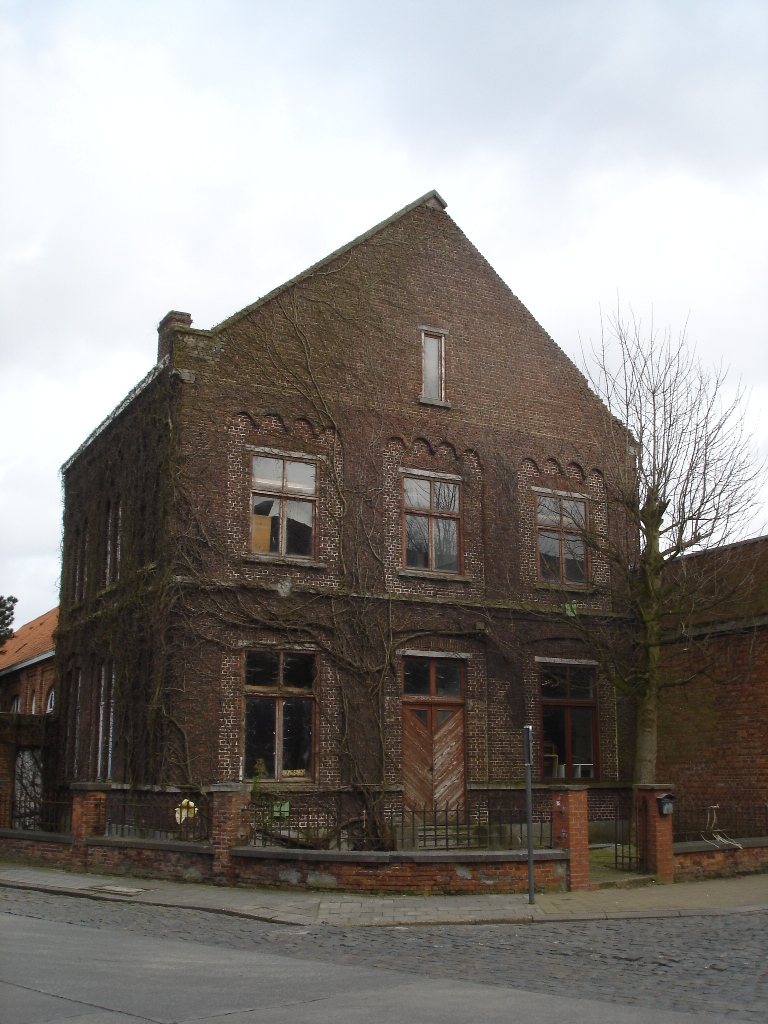 Het Scolus: vroeger was dit de woning van de directeur. Maar na de Tweede Wereldoorlog is het gebouw in verval geraakt. De plaatselijke chiro heeft het nog een tijdje ingenomen als zijn thuisbasis, maar in 2008 werd definitief beslist dat het gebouw afgebroken moet worden.